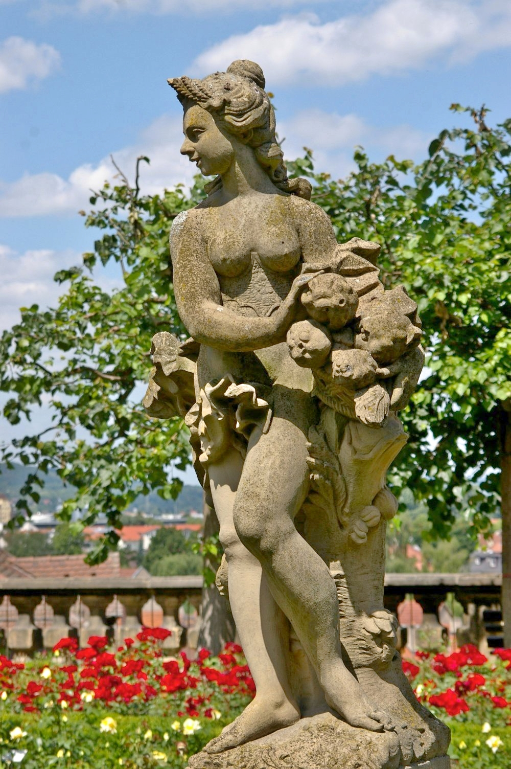 Bamberg-Residenz-Rosengarten-Figur